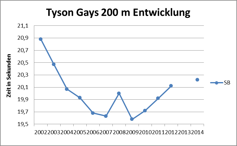 Entwicklung der Saisonbestleistung Tyson Gays über 200 Meter